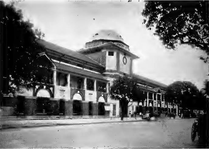 Scott Market, Rangoon